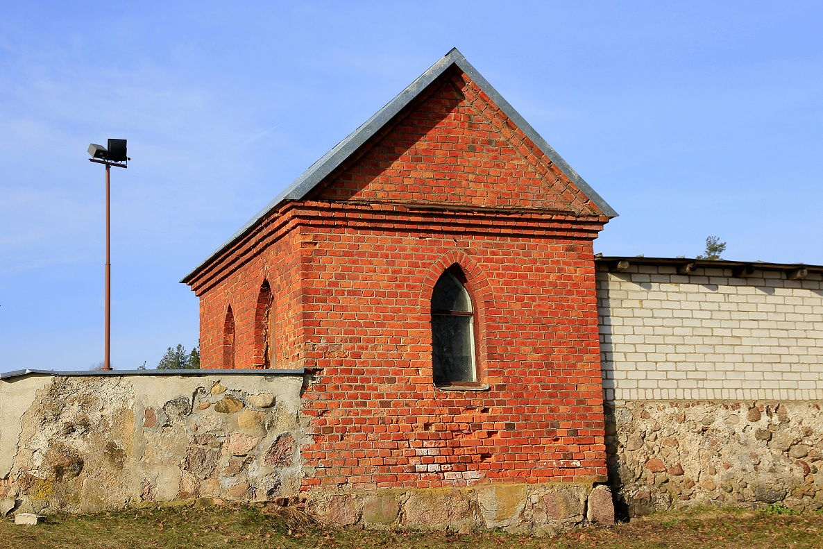 Івянец. Касцёл Святога Аляксея. Вартоўня